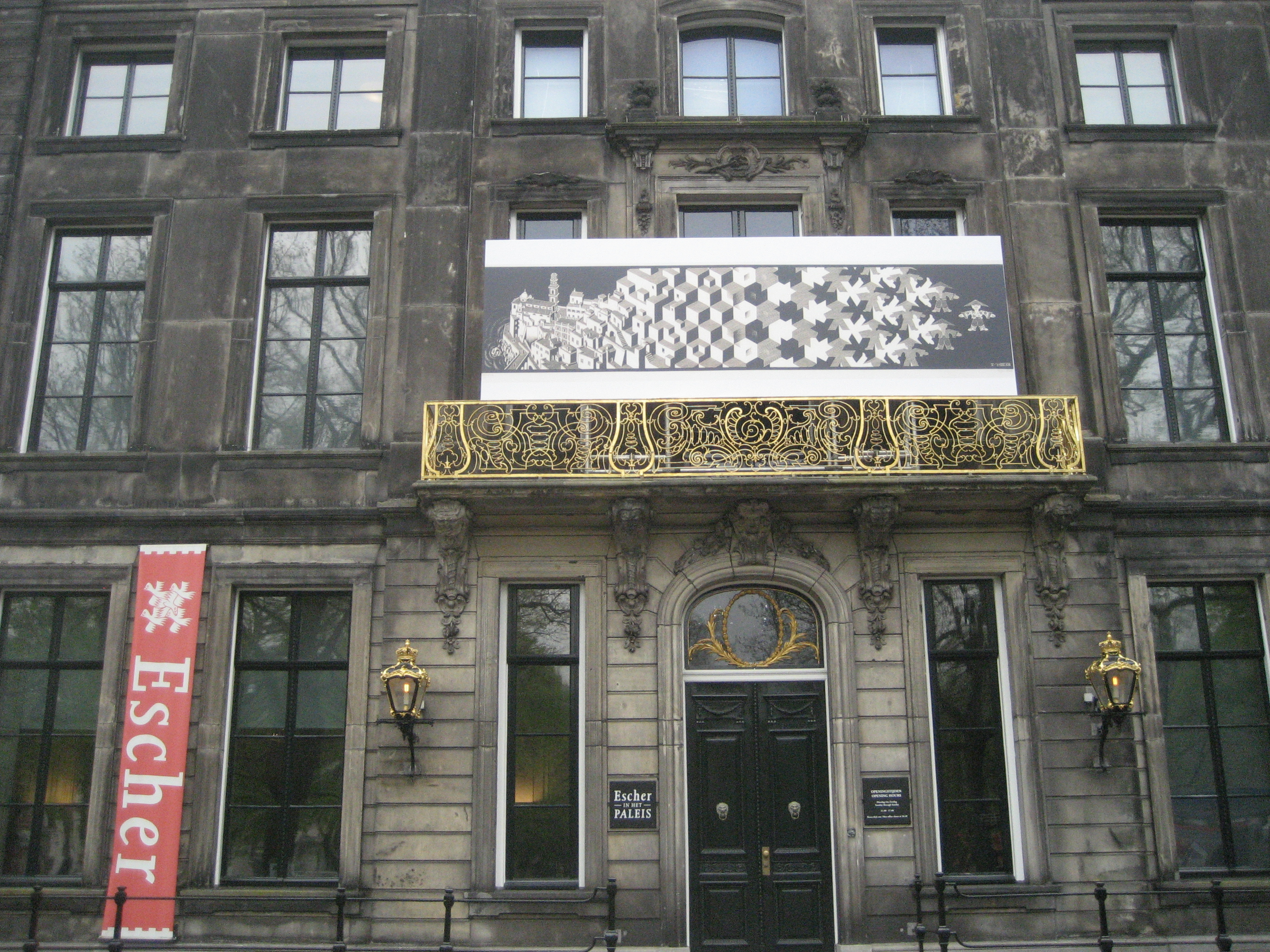 Escherhuis, Lange Voorhout 74, 2514 EH, Den Haag (Nederland)